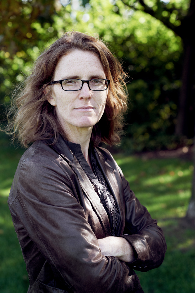 Portraitfoto Angela Glajcar